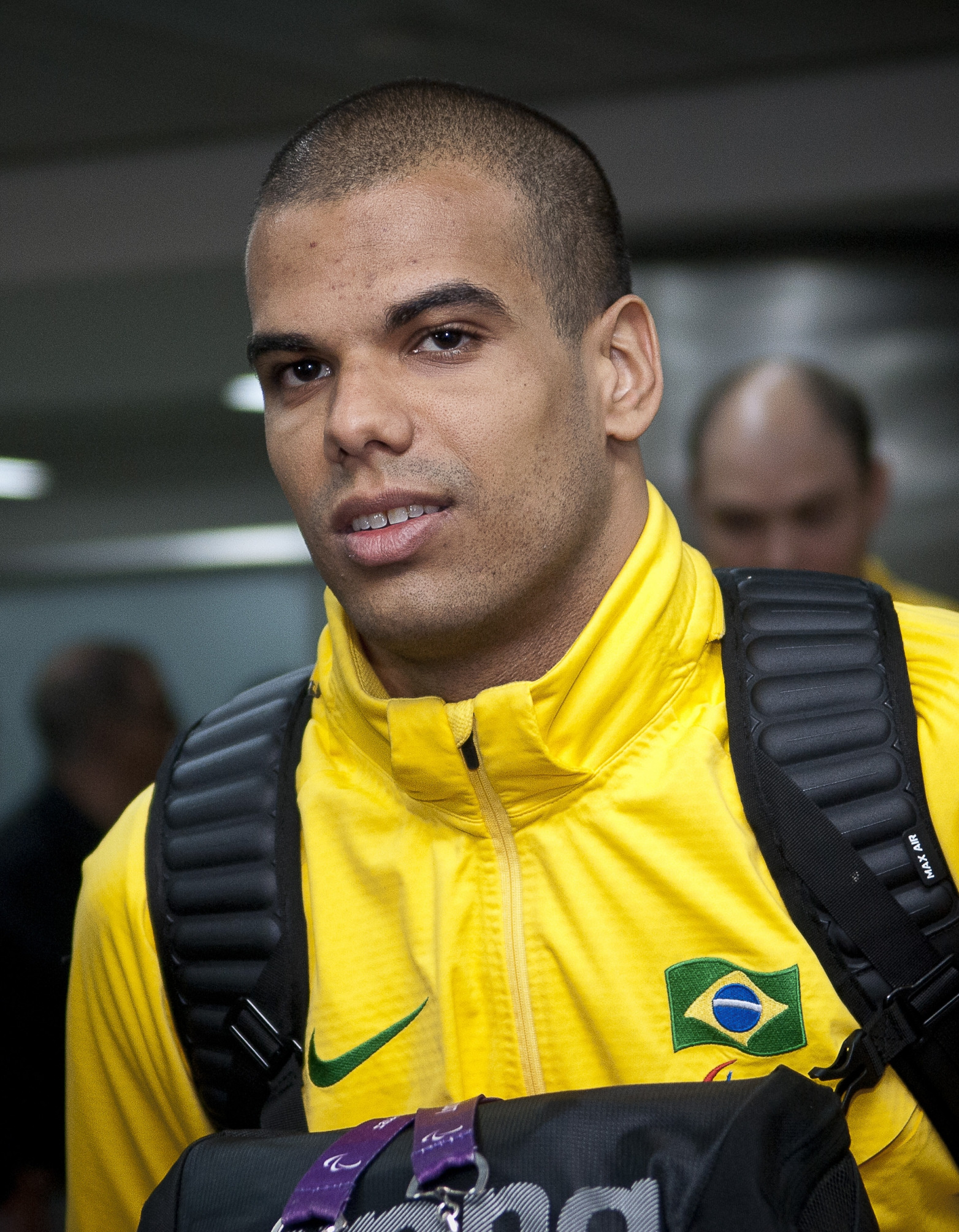 São Paulo - O nadador paralímpico, André Brasil, que conquistou 3 medalhas de ouro na competição, desembarca no aeroporto de Guarulhos, em São Paulo.